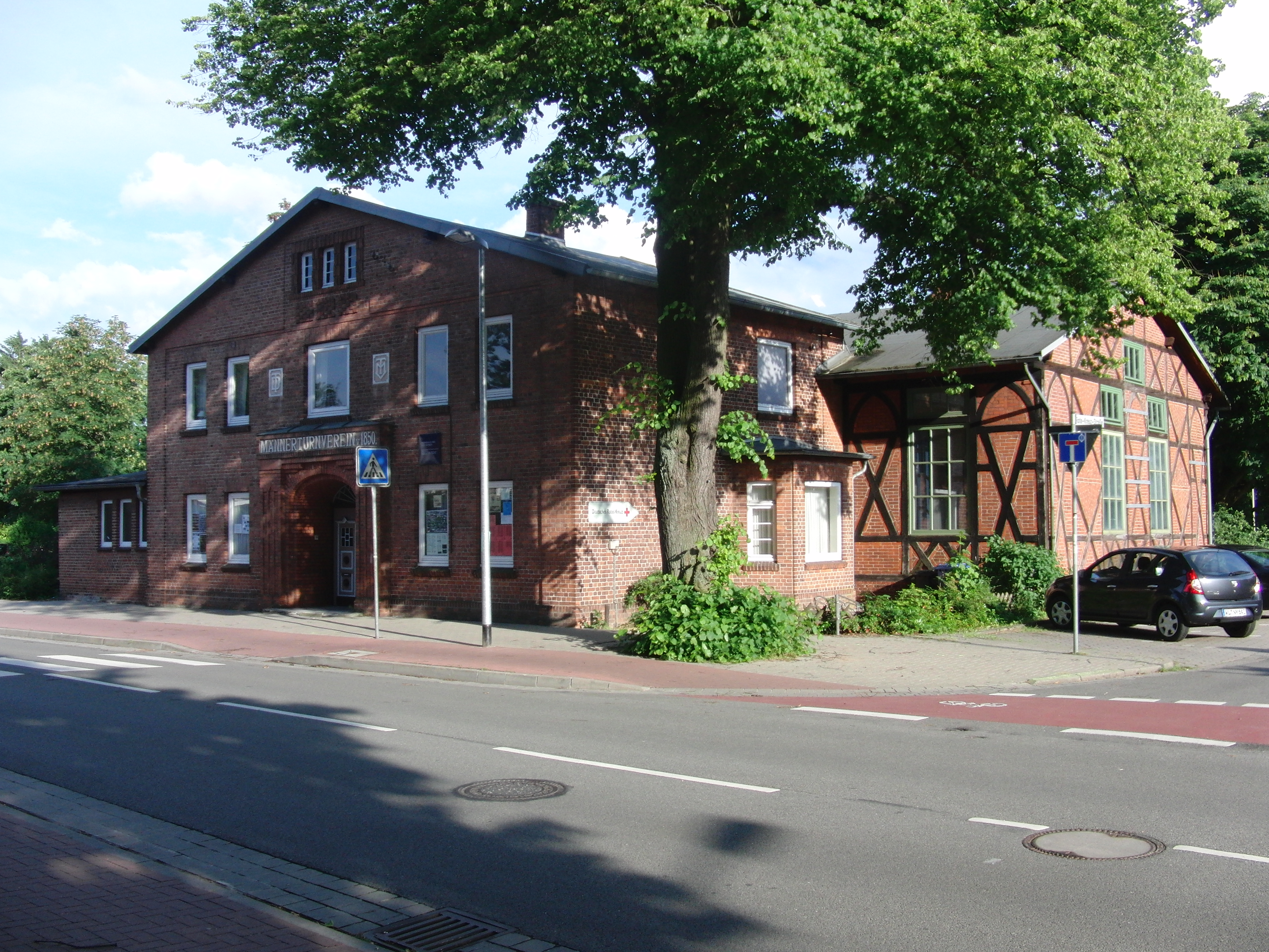 Die alte, 1889 erbaute MTV-Turnhalle an der Eckermannstraße in Winsen (Luhe). Aufnahme von 2013, knapp drei Jahre vor der Zerstörung durch Brandstiftung.